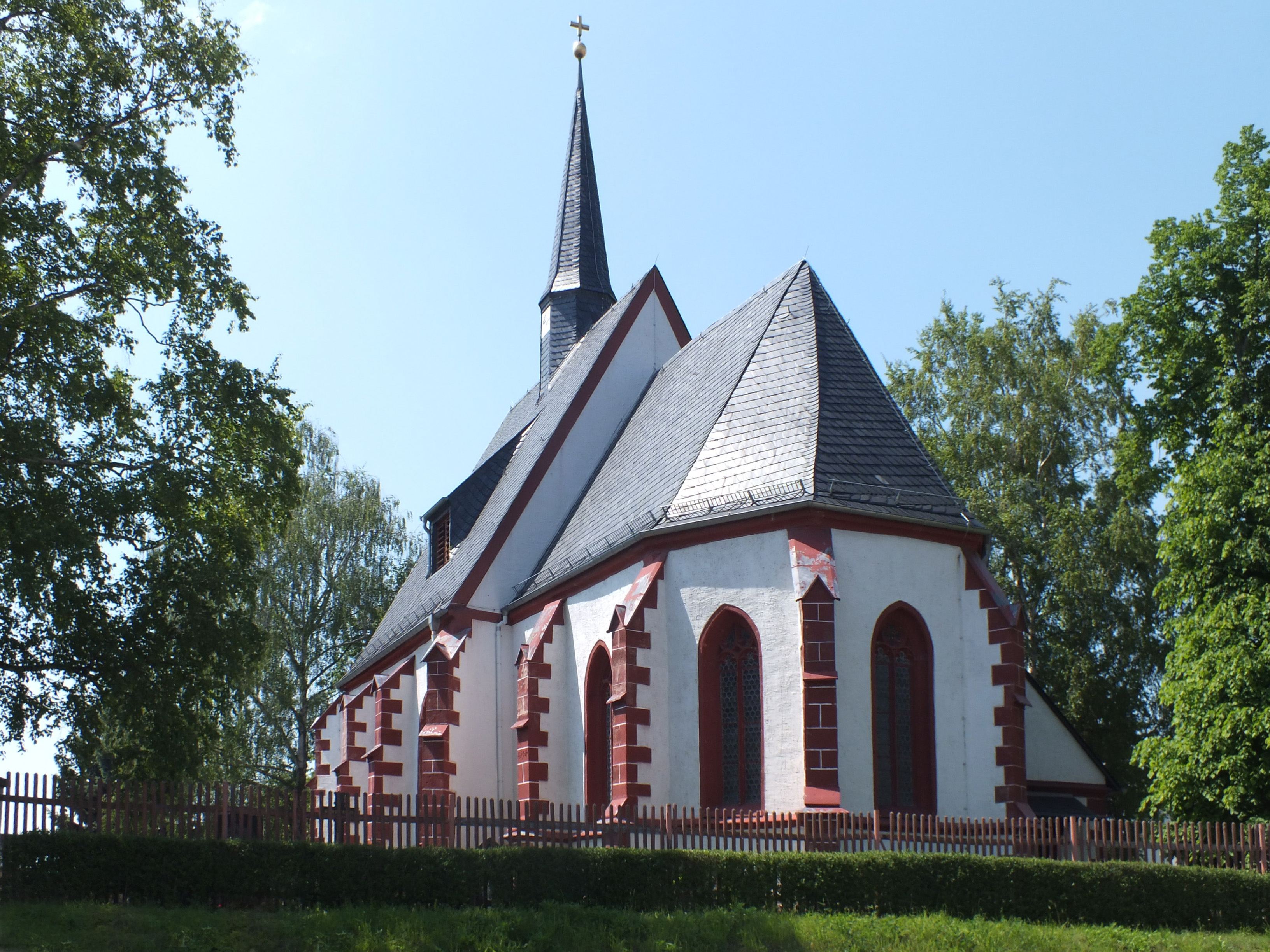 Die St. Stephanus-Kirche in Wyhra